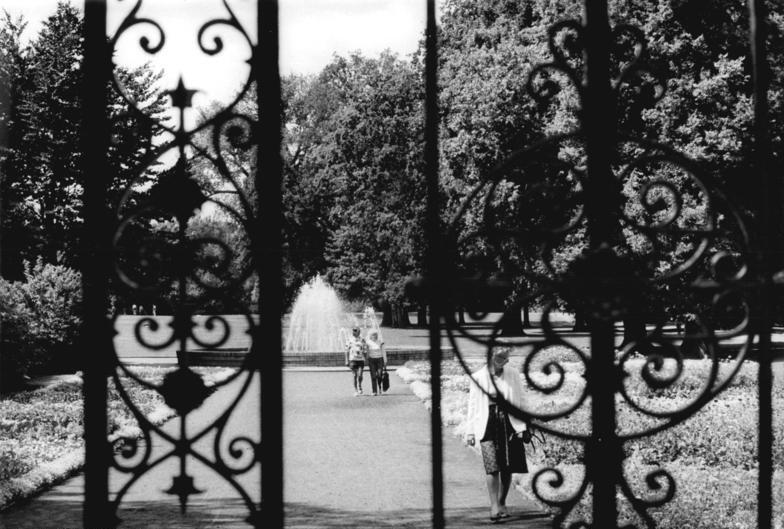 Berlin-Pankow, Bürgerpark ADN-ZB Franke 31.7.89 Berlin: Pankow- Ein schöner schmiedeisernes Tor bildet den Eingang zum Bürgerpark, der 1854 nach italienischem Vorbild angelegt wurde. Mit seinen ausgedehnten Anlagen bietet er heute noch Erholung und Entspannung. Hier fließt auch die Panke, ein 23 km langes Flüßchen, dem der Stadtbezirk seinen slawischen Namen verdankt. Für die Berliner ist Pankow mit seinen 1 425 Hektar Grünflächen, Parkanlagen und Waldflächen sowie mit rund 9 100 Kleingärten eine beachtliche "güne Lunge".